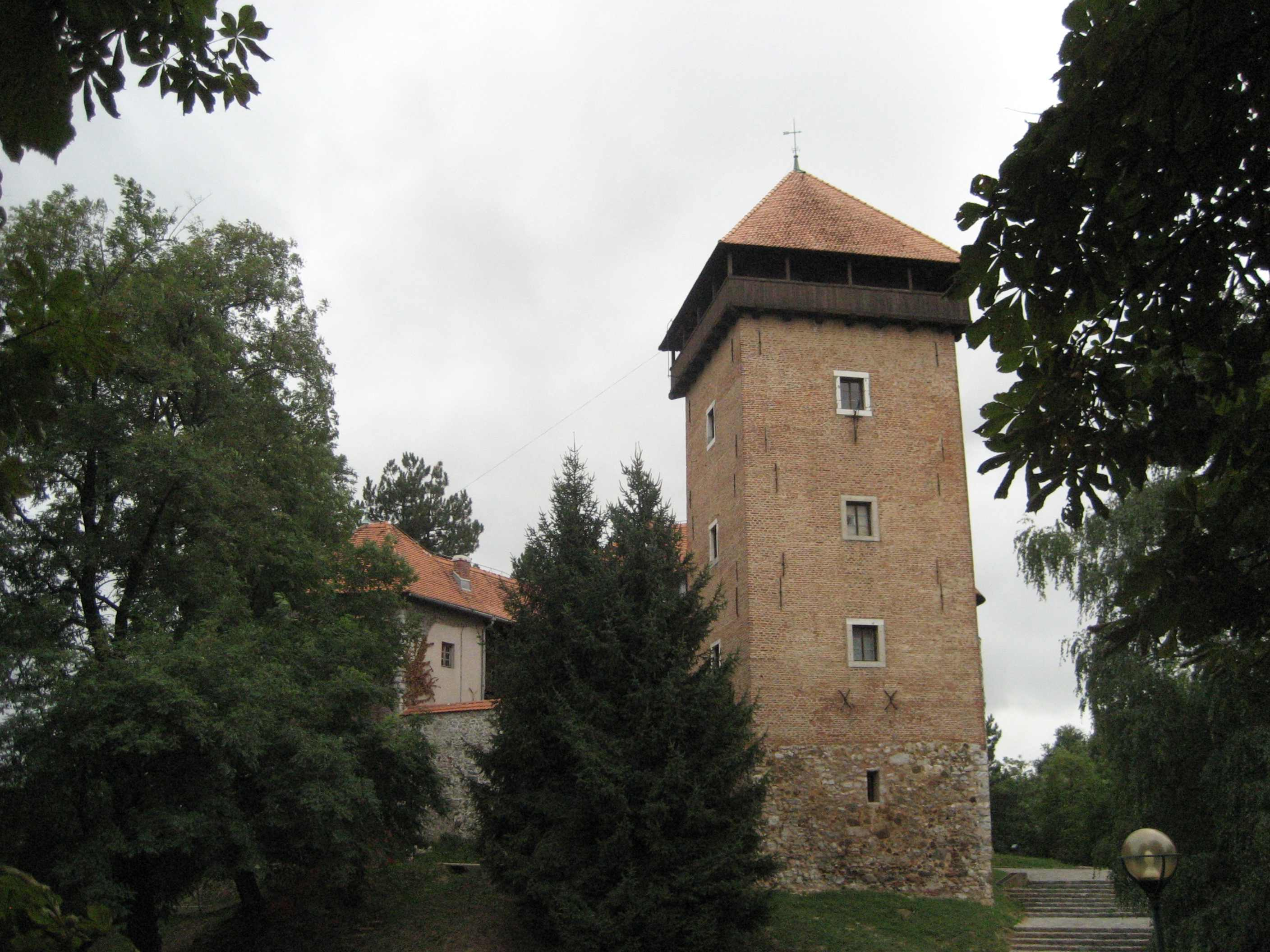 Dobovac Castle, Karlovac, Croatia